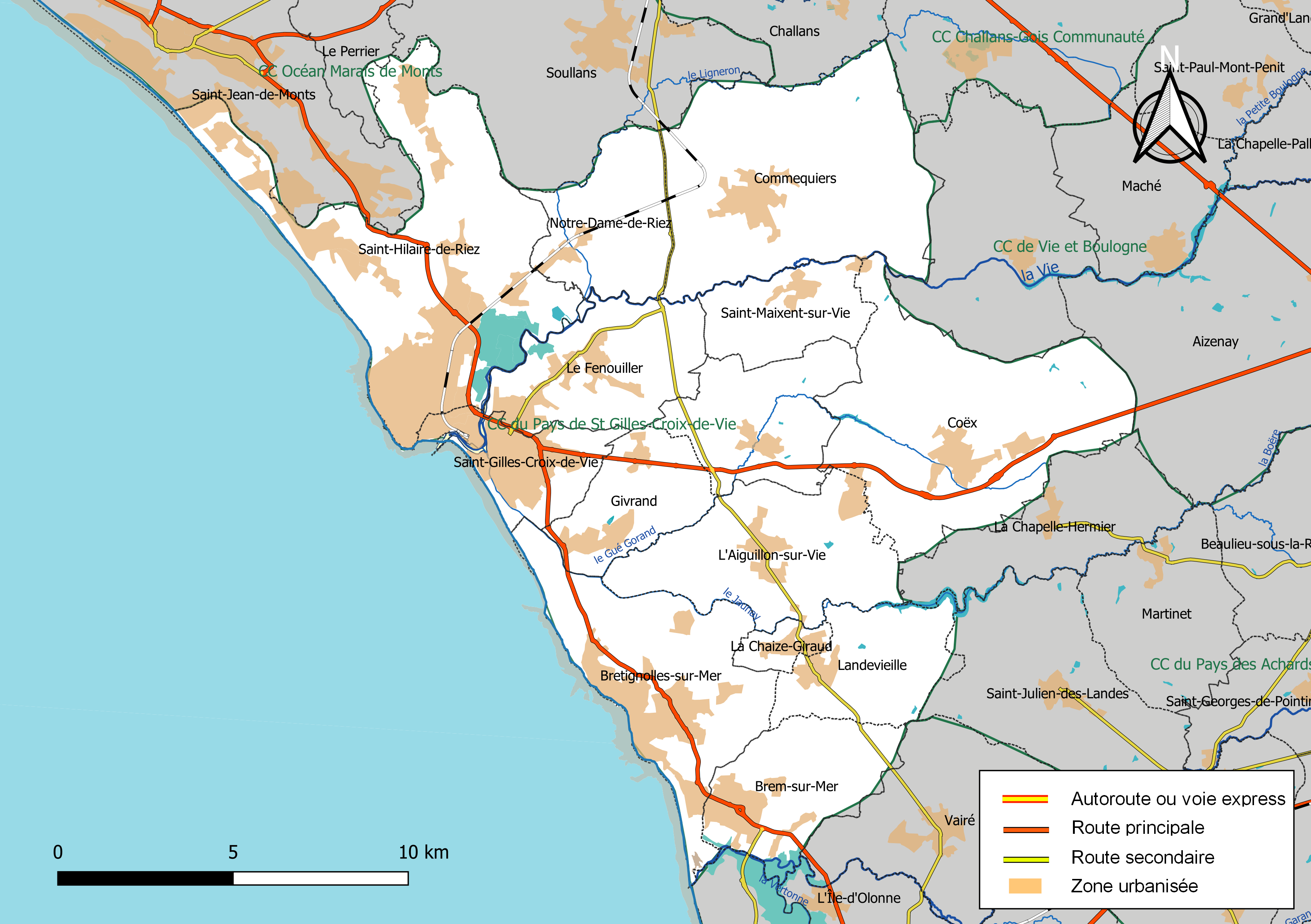 Carte géographique de la Communauté de communes du Pays de Saint-Gilles-Croix-de-Vie, département de la Vendée, France. Composition au 1er janvier 2019.